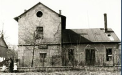 Dr. Krepuska Géza présháza